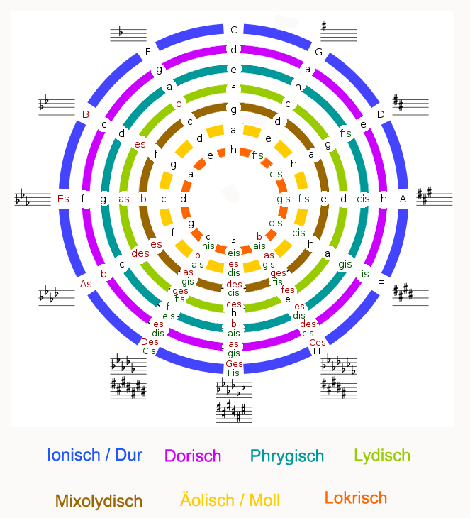 Erweiterter Quintenzirkel für die modalen Tonarten